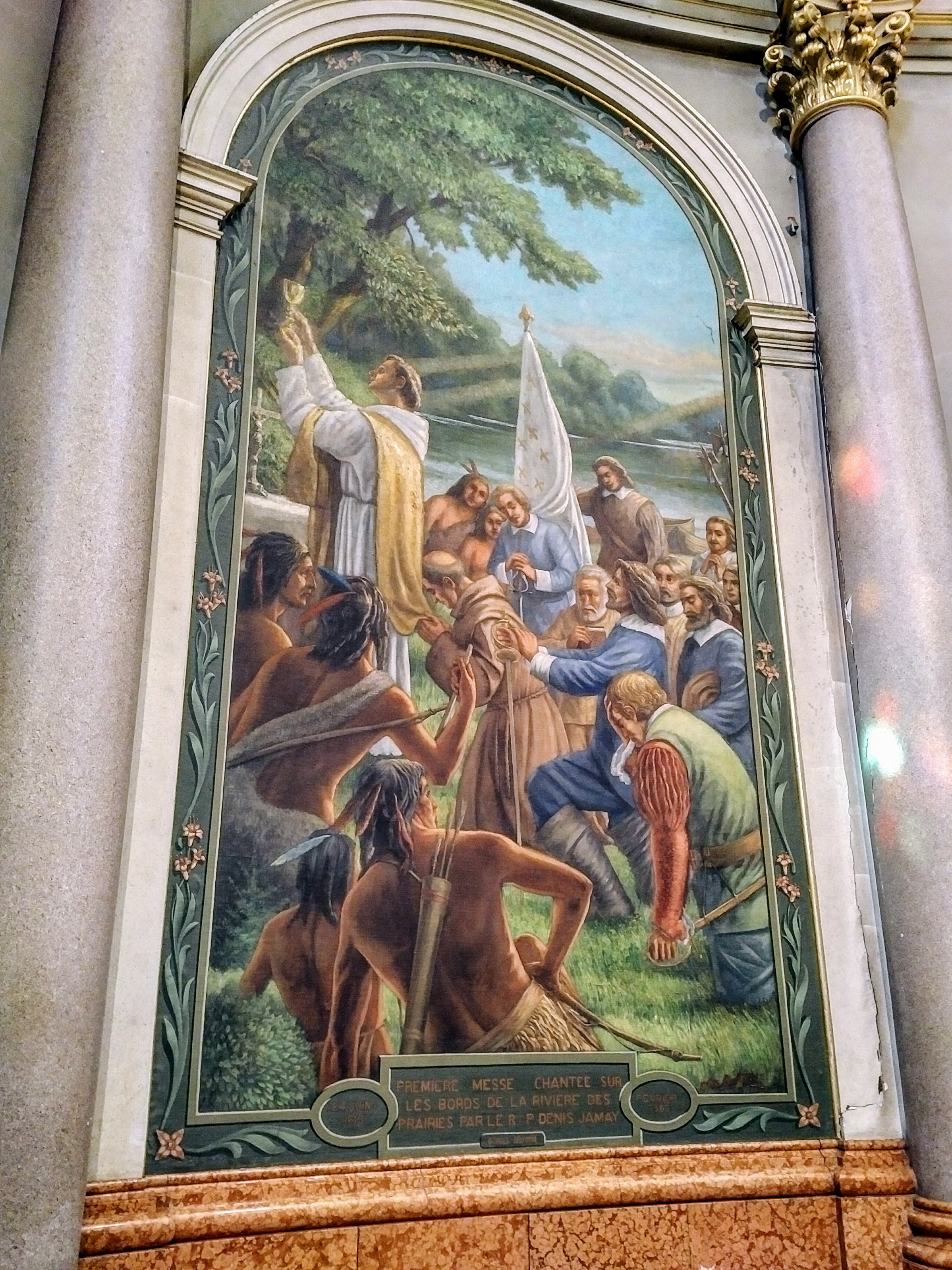 Première messe chantée sur les bords de la rivière des Prairies par le R. P. Denis Jamay, 24 juin 1615. Toile marouflée située dans le transept ouest de la cathédrale-basilique Marie-Reine-du-Monde à Montréal, février 1908 par Georges Delfosse. Les missionnaires récollets Joseph Le Caron et Denis Jamet célébrent la messe autour d'un groupe comprenant Samuel de Champlain. Il relate dans ses récits que les Amérindiens étaient en admiration devant les cérémonies et les ornements religieux.[1]. Le 24 juin 1615, le Père Denis Jamay, un récollet, célèbre la première messe à la Rivière-des-Prairies. Le Père Joseph Le Caron tient le bord de sa chasuble. Samuel de Champlain, le fondateur de Québec, est au centre[2].